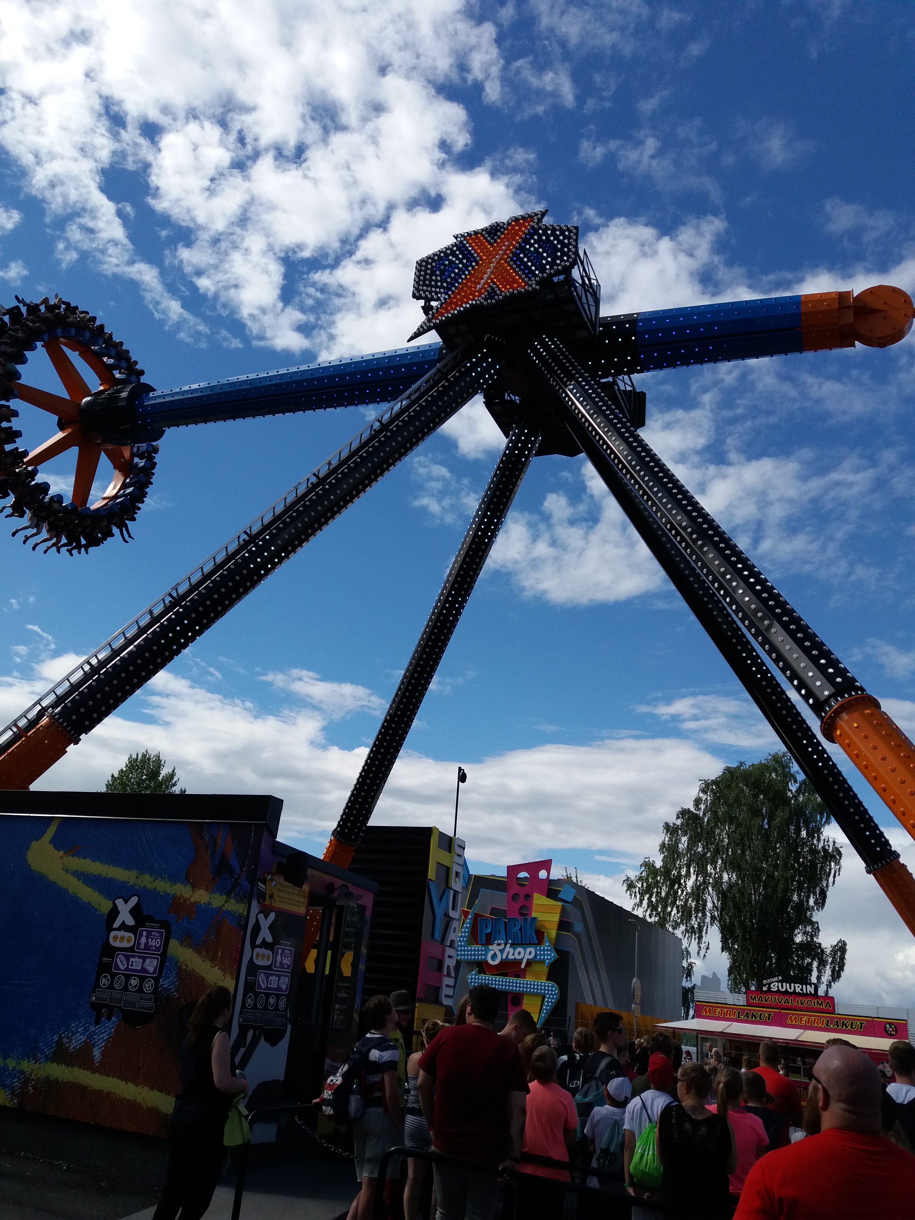 X-laite Särkänniemen huvipuistossa Tampereella